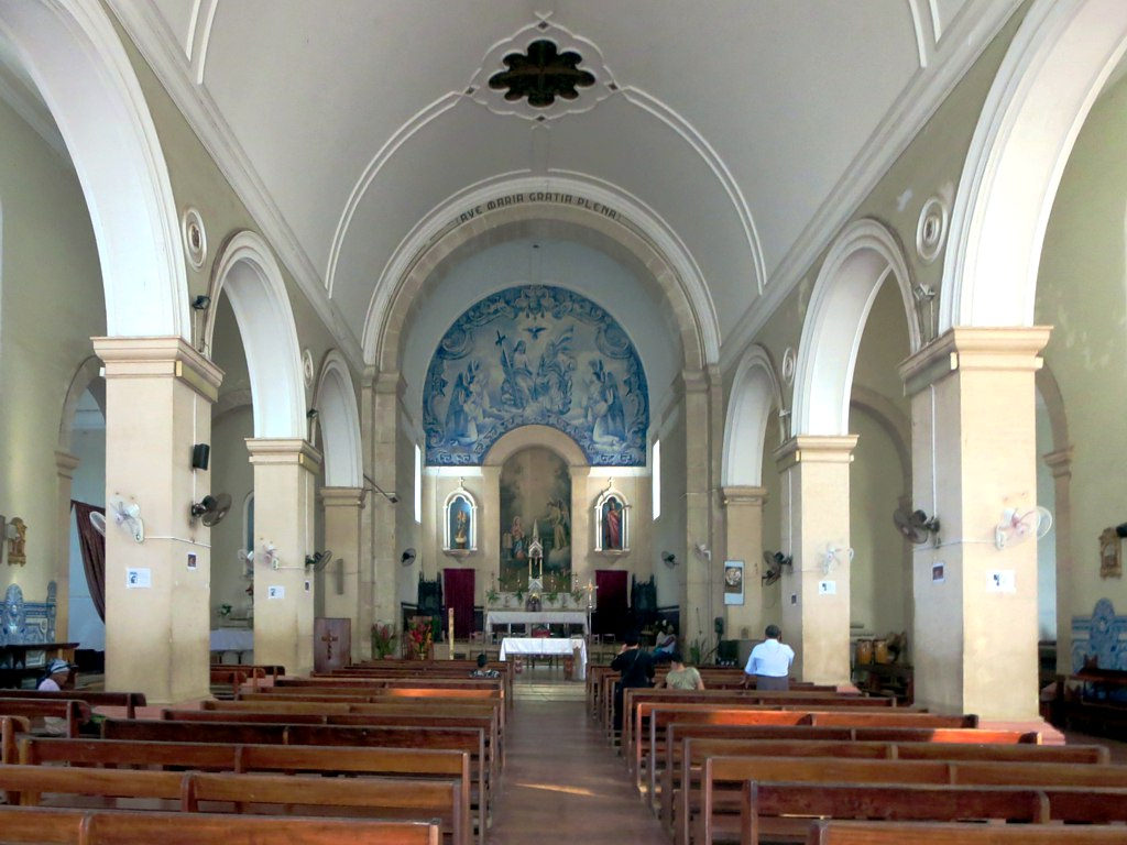 Blue ceramic tiles adorn the interior of the Catedral de Nossa Senhora da Graça in Sao Tome, São Tomé and Príncipe.